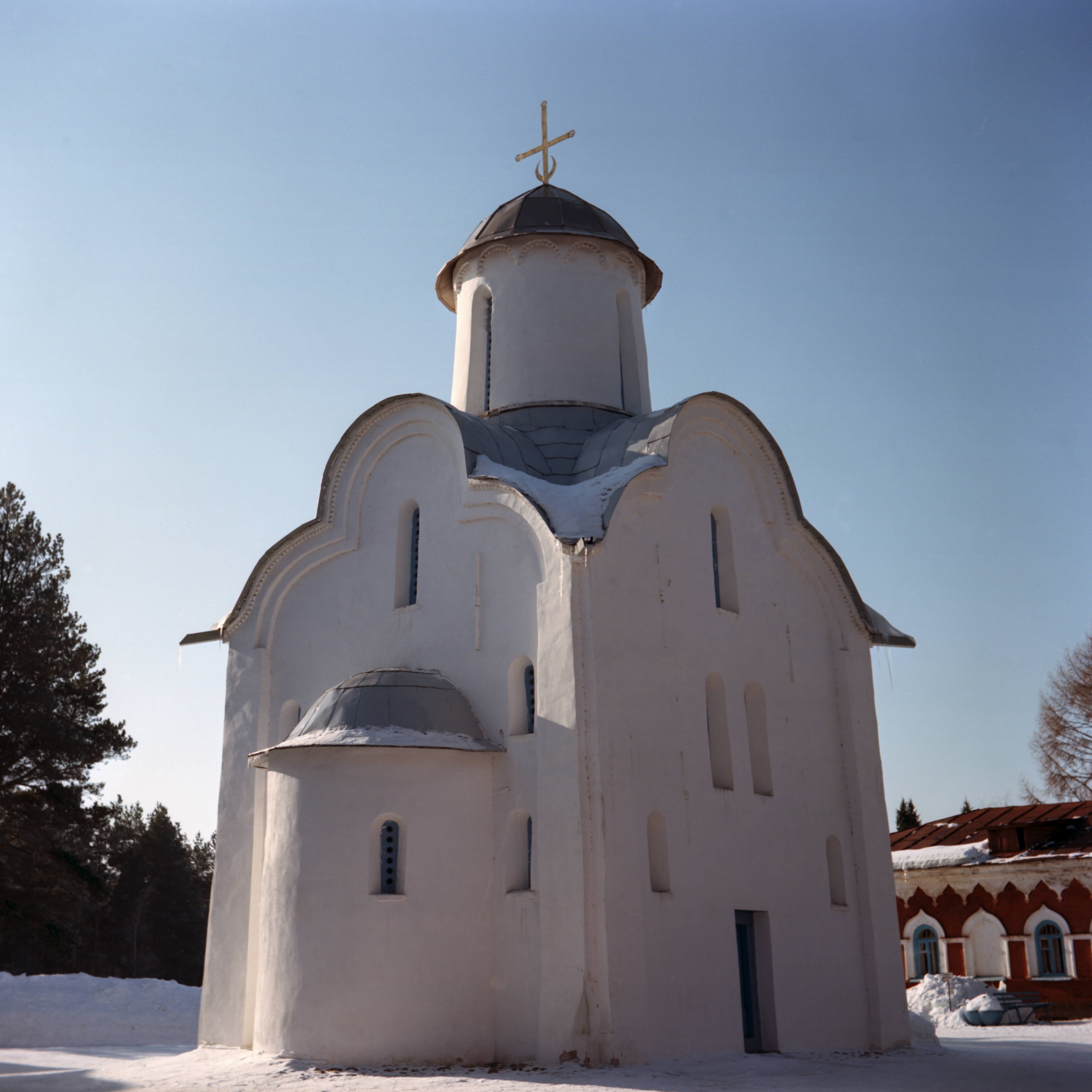 Церковь Рождества Богородицы: Перынский скит, Великий Новгород, Новгородская область